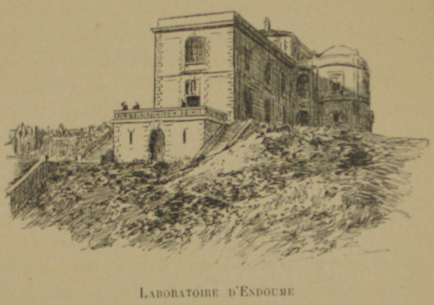 Le laboratoire d'Endoume, en 1897, au temps d'Antoine Fortuné Marion (1846–1900)